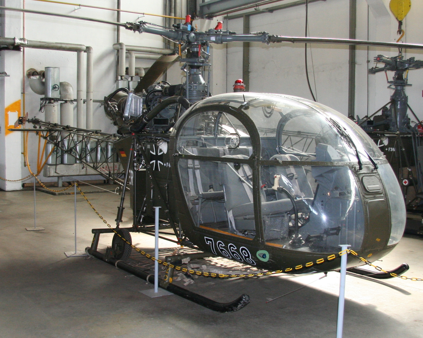 Alouette II im Museum für Luftfahrt und Technik in Wernigerode